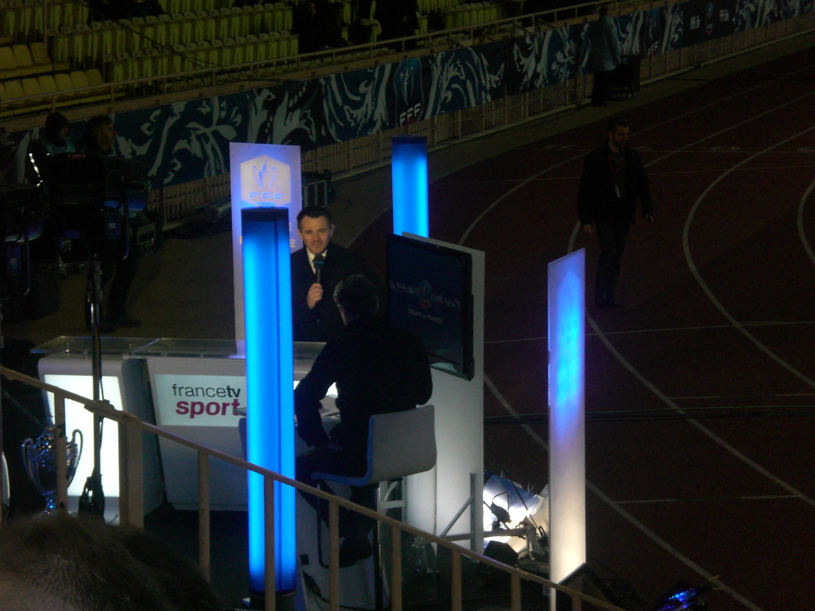 Plateau de France Télévision, avec Laurent Luyat et Willy Sagnol, installé aux abords de la pelouse du Stade Louis II pour Monaco - Lens, quart de finale de la Coupe de France de football.